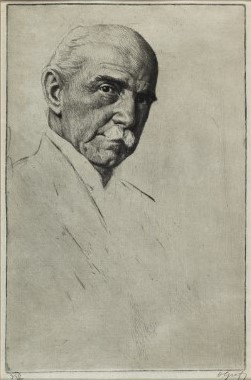 Portrait Walther von Dyck ((c) Kepler-Gesellschaft).